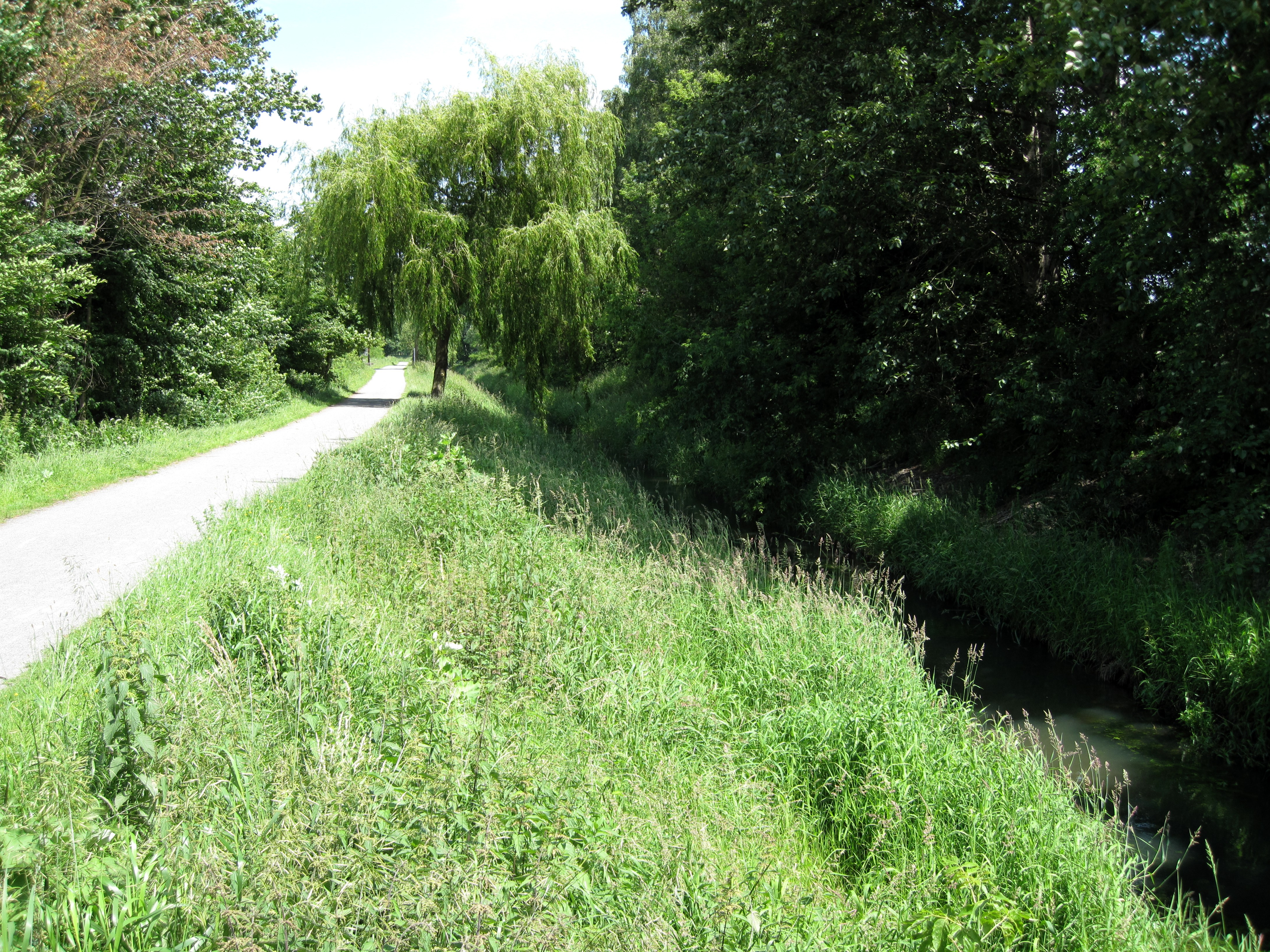 Panke nördlich der Pankgrafenstraße als Grenzfluss zwischen Berlin-Karow und Berlin-Französisch Buchholz